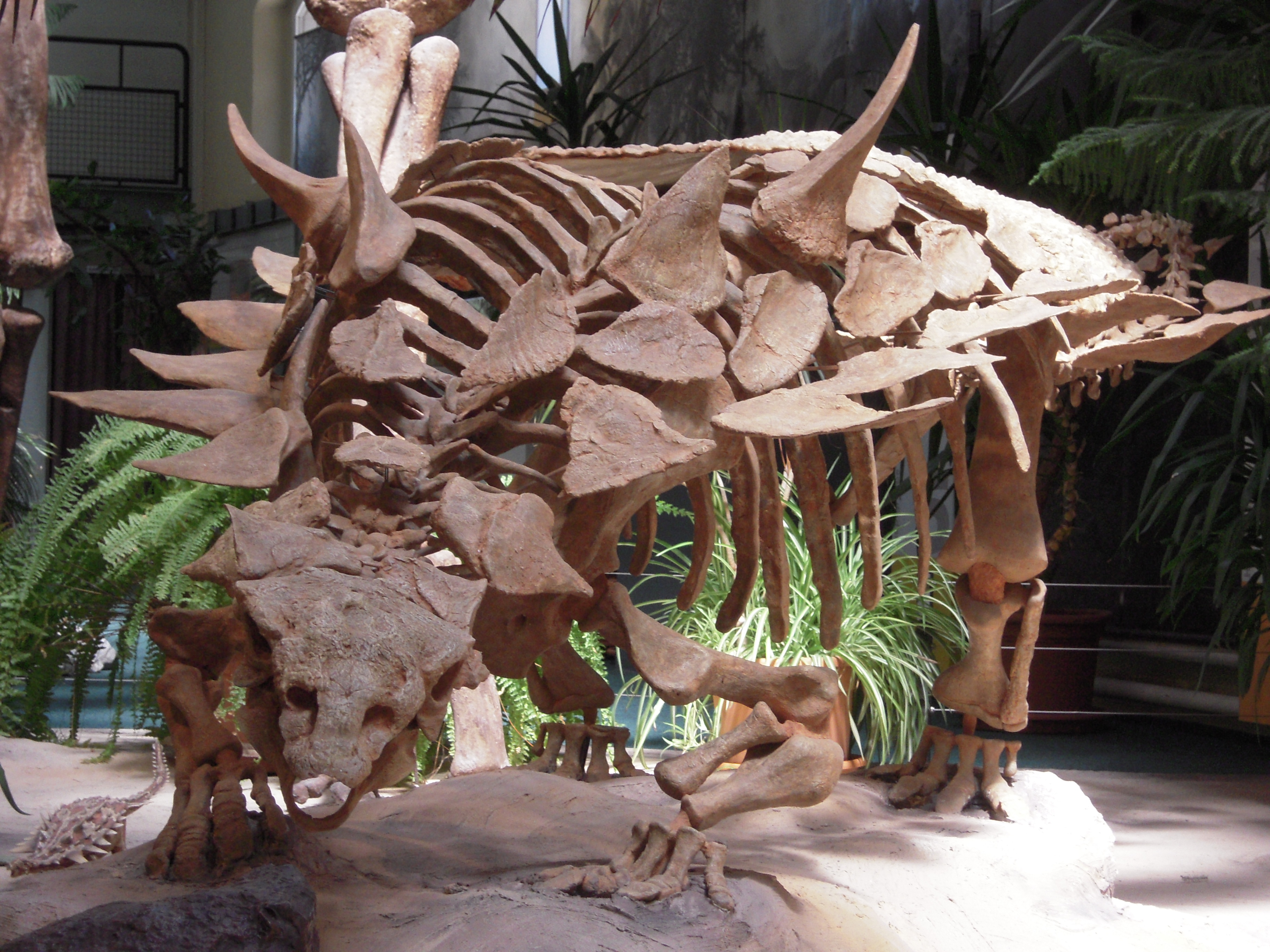 Skelettrekonstruktion von Gastonia, einem Ankylosaurier